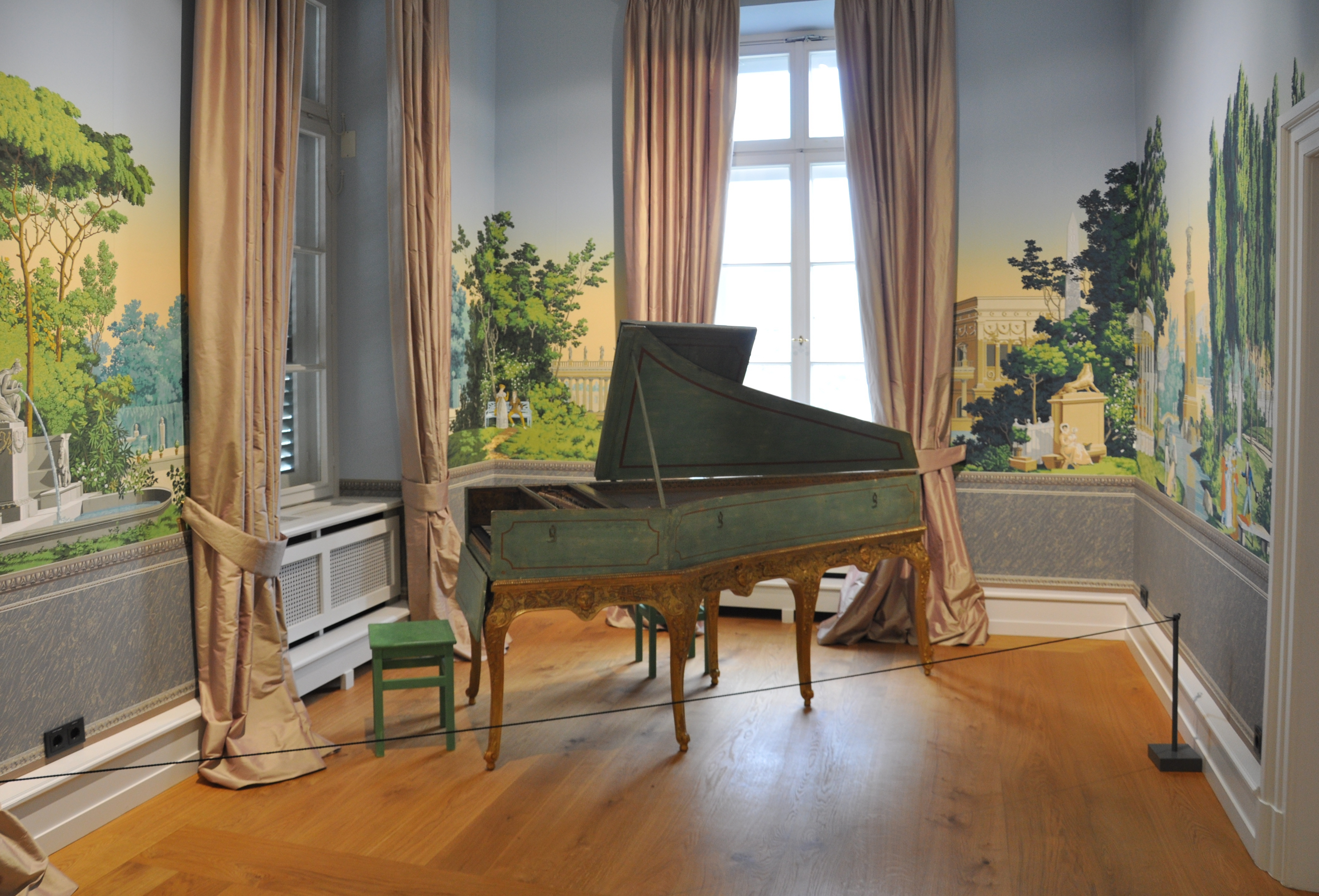 Museum für Angewandte Kunst Frankfurt; Villa Metzler